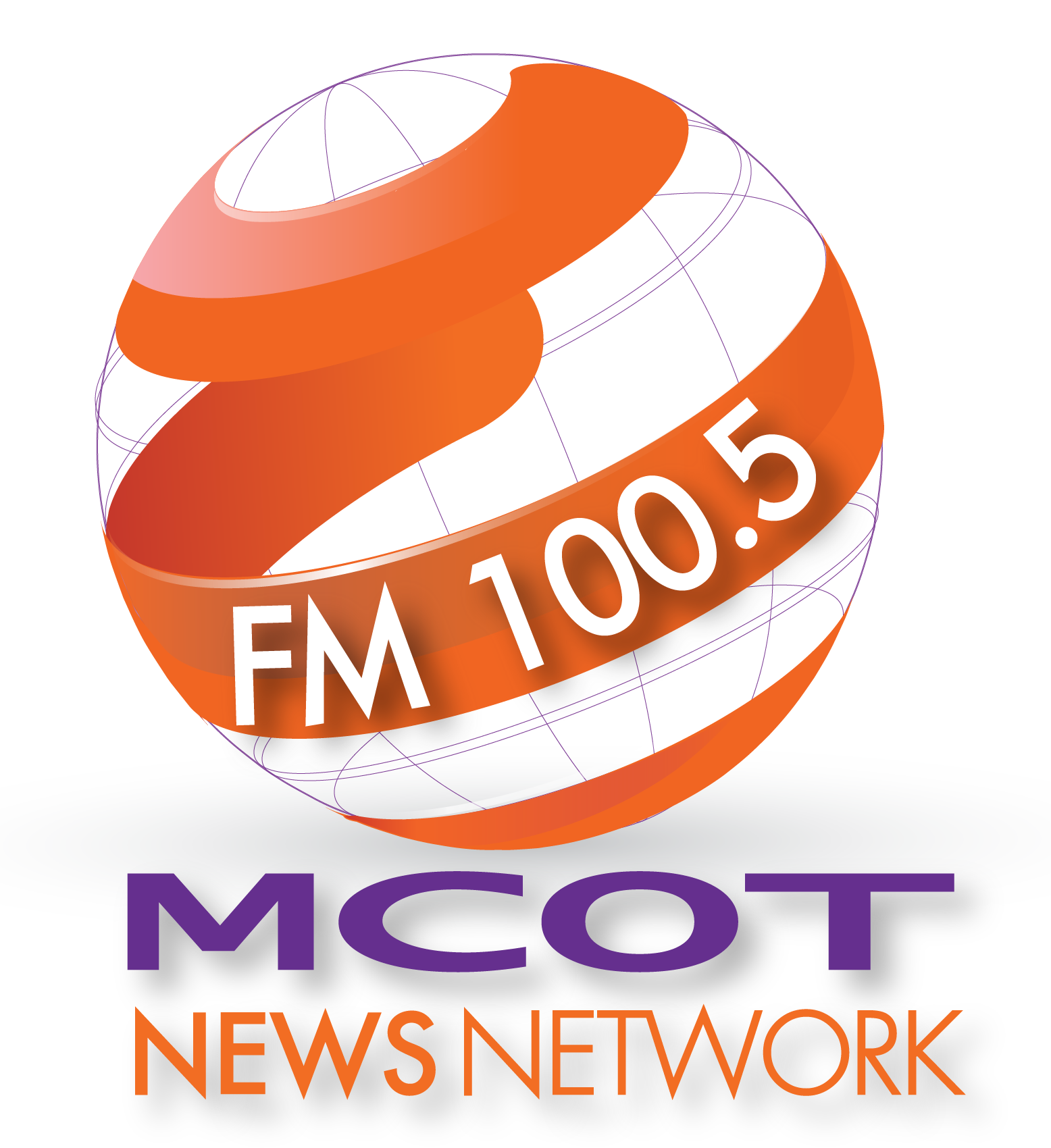 LOGO FM100.5